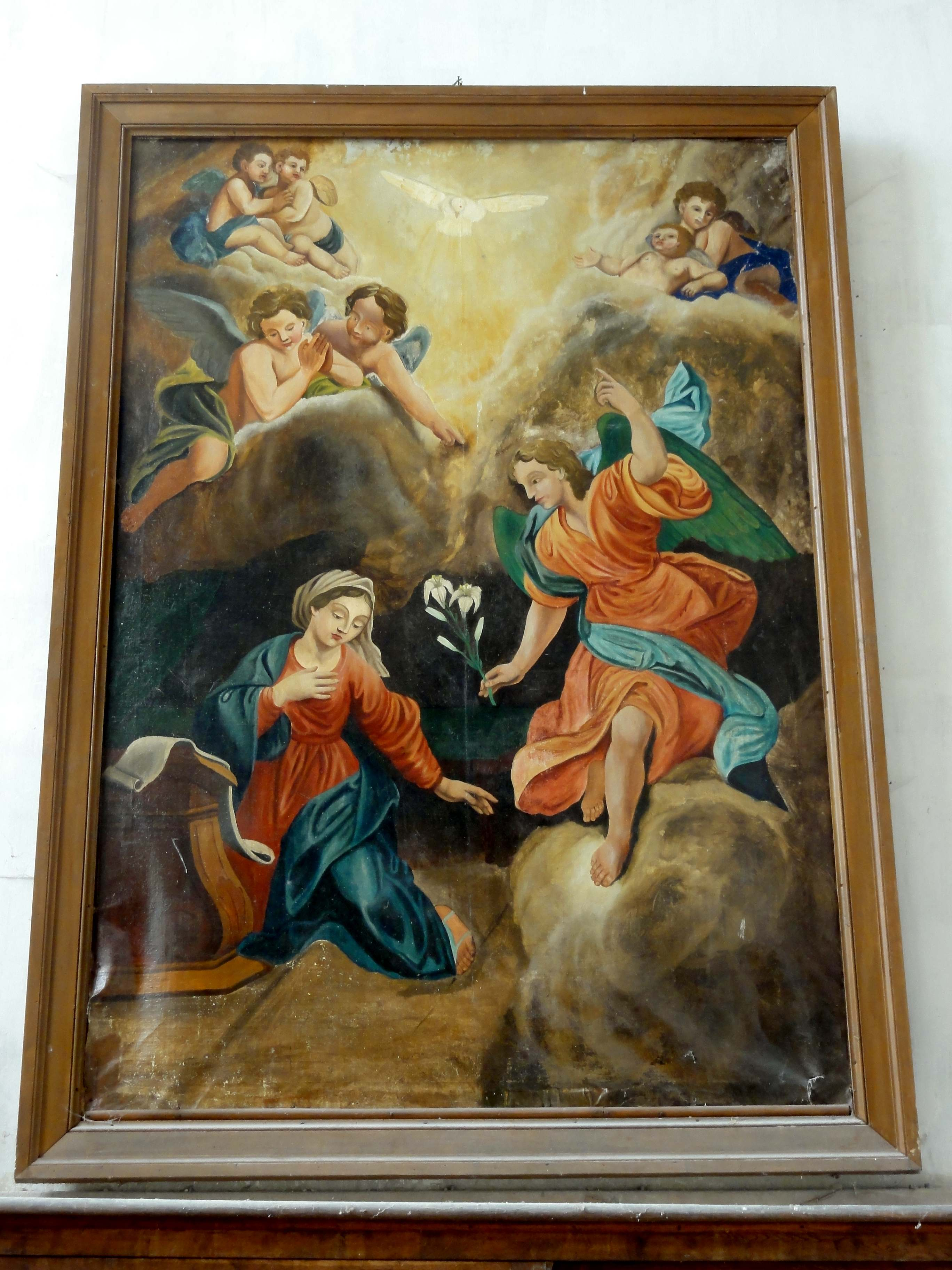 Mobilier de l'église (voir titre).